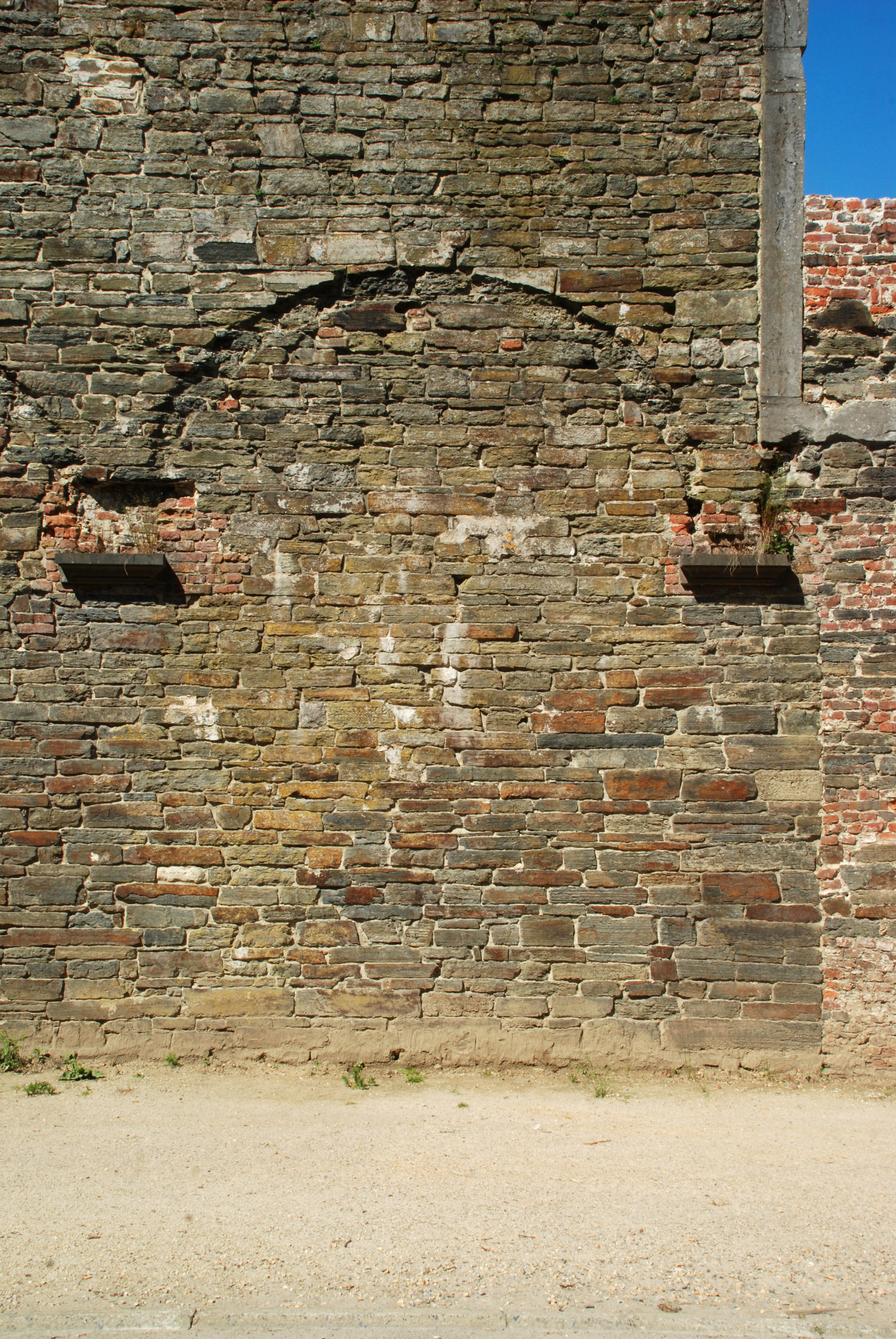 Belgique - Brabant wallon - Villers-la-Ville - ancienne pharmacie de l'Abbaye